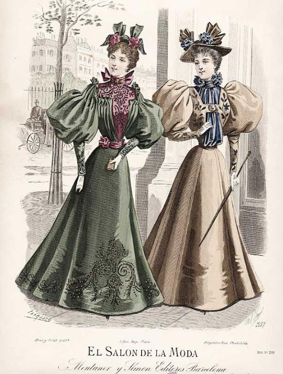 El Salón de la Moda, Montaner y Simón Editores.